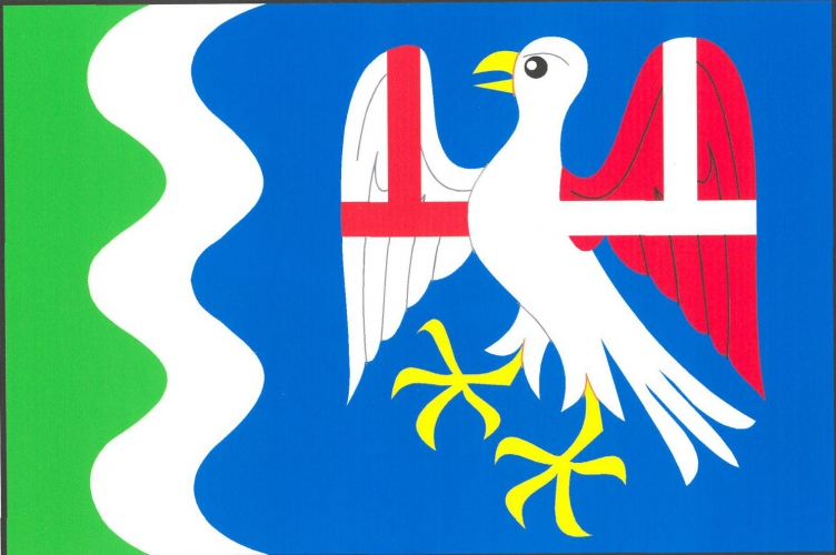 vlajka, Březnice, okres Tábor